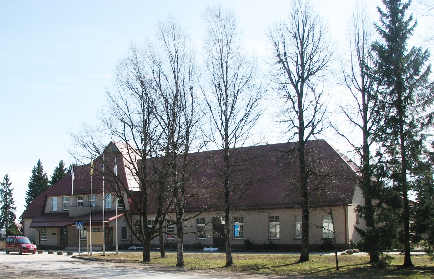 Kullamaa vallavalitsuse hoone